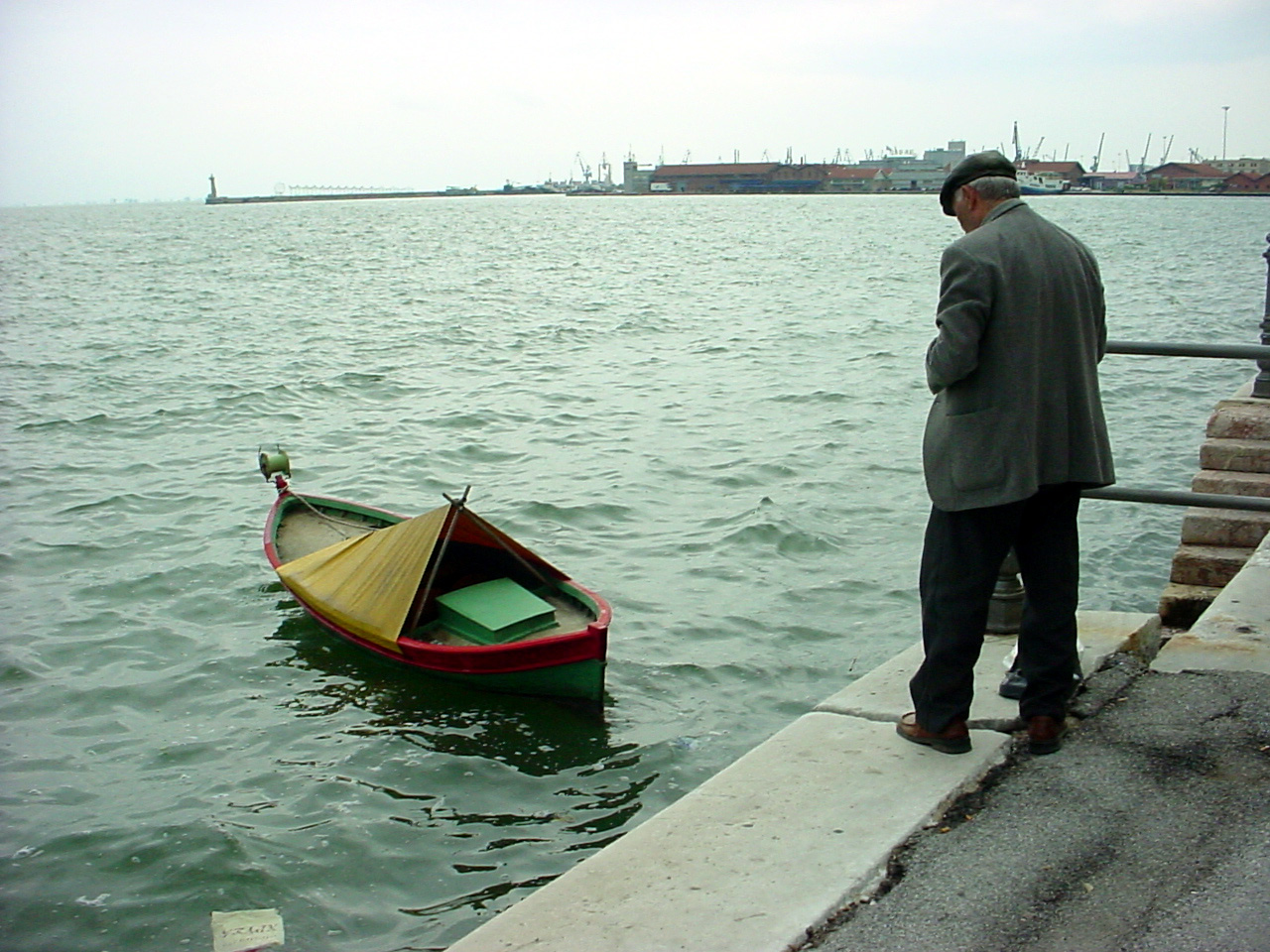 Abuelo Pescando en el Golfo de Tesalonica